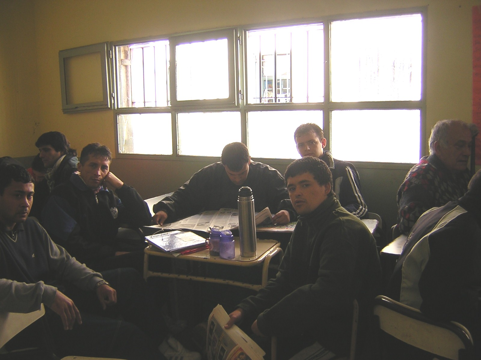 un grupo de estudiantes en la Unidad Penitenciaria N 9 de La Plata